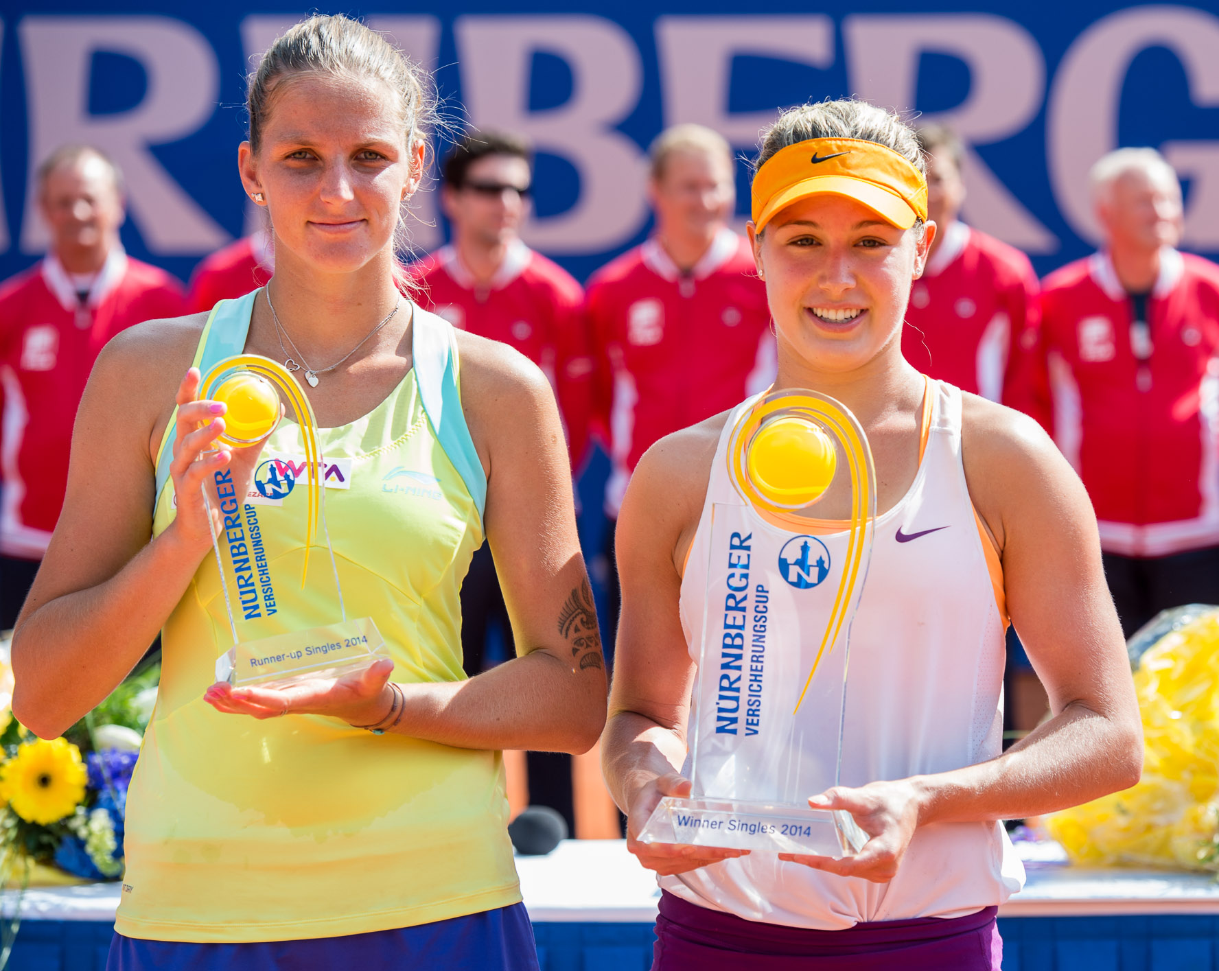 Damentennis,Eugenie Bouchard,Karolina Pliskova,Karolína Plíšková,Nürnberger Versicherungscup 2014,Siegerehrung,Tennis,WTA